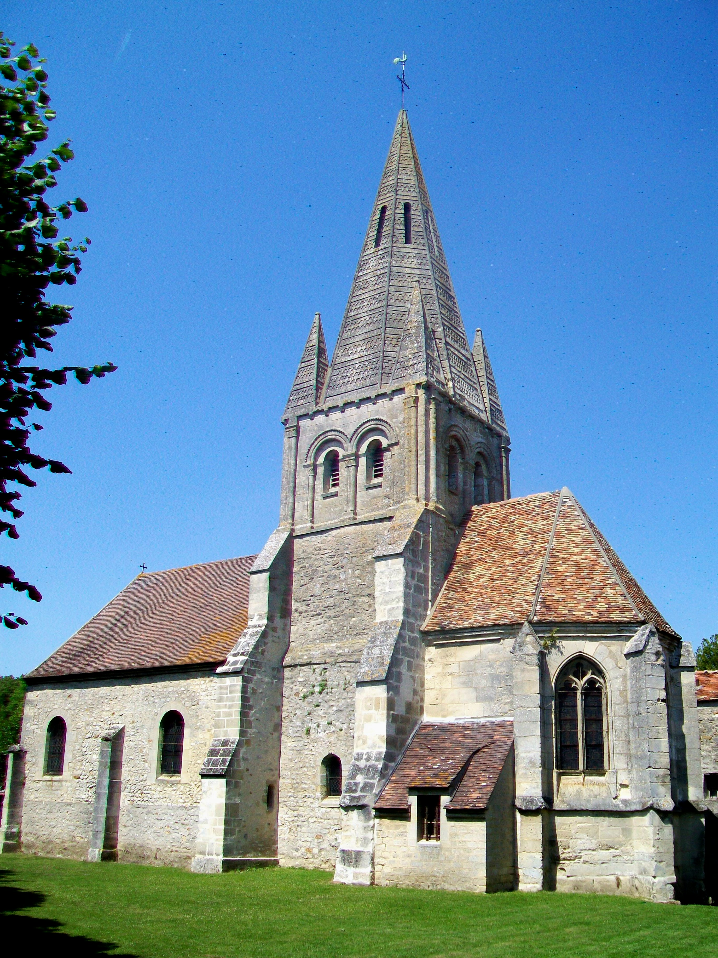 Vue d'ensemble de l'église depuis le sud-est.